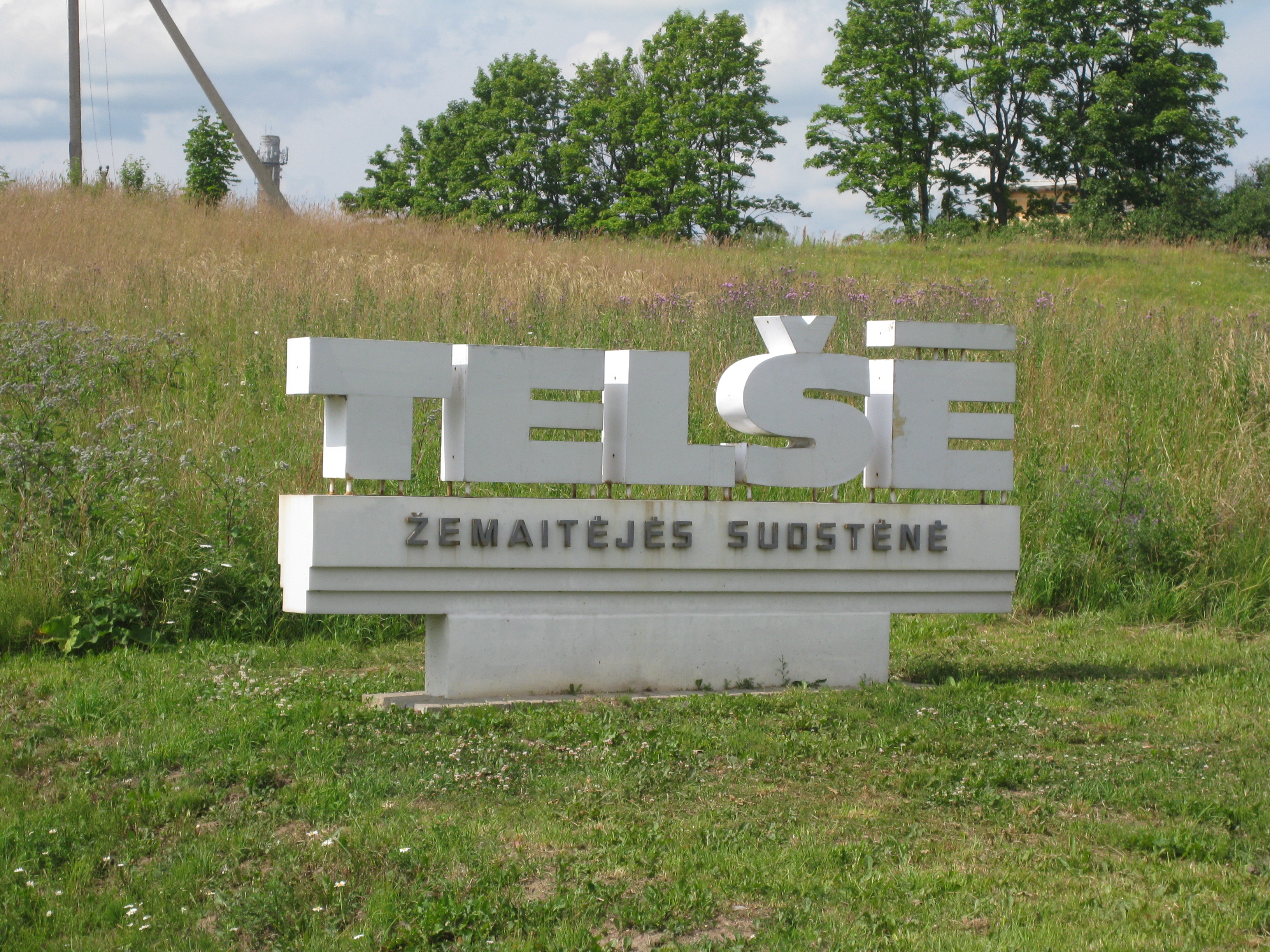 Žemaitėška: Telšiū žėnklos